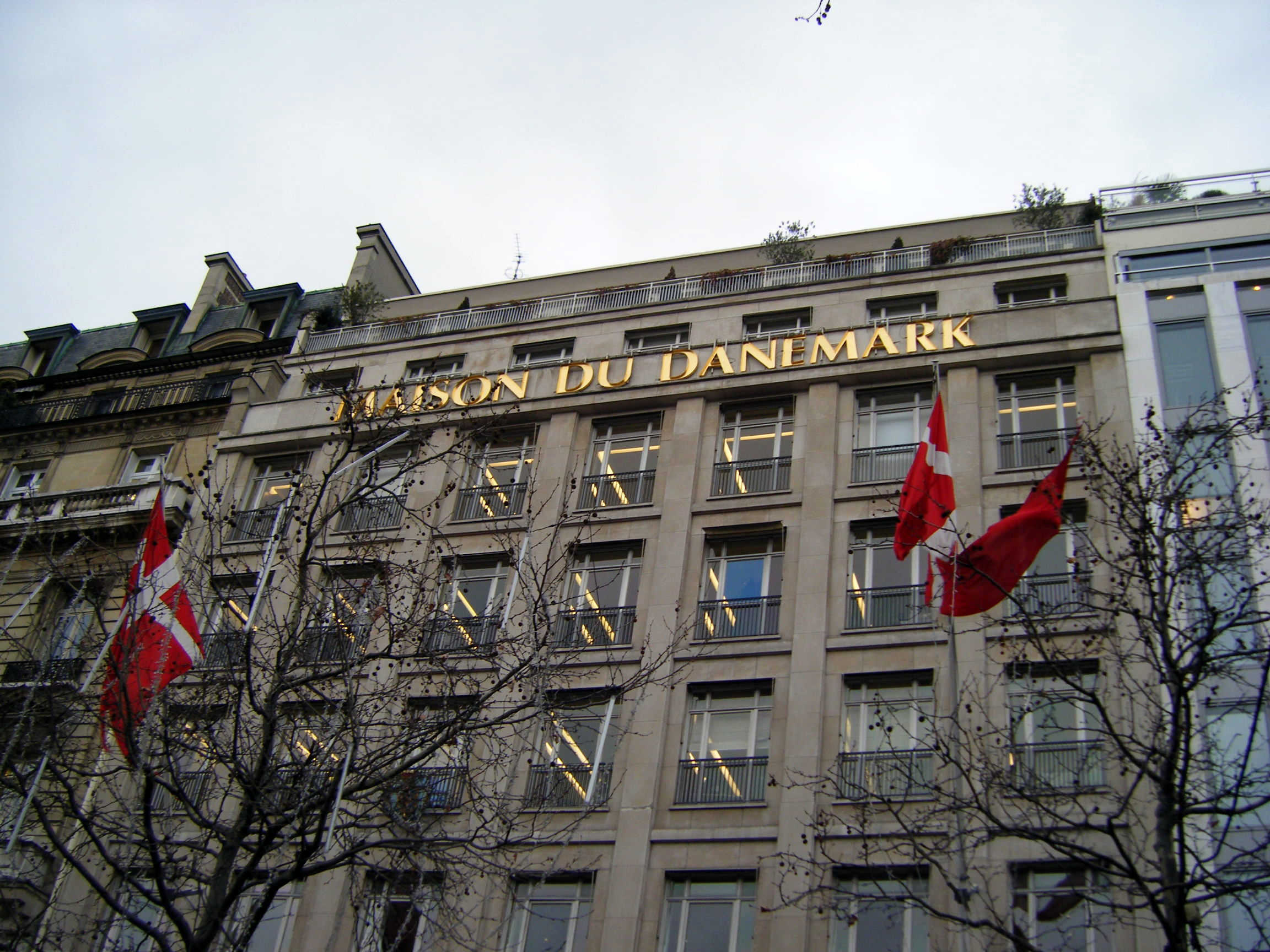 Maison du Danemark (House of Denmark) on Champs-Élysées in Paris France